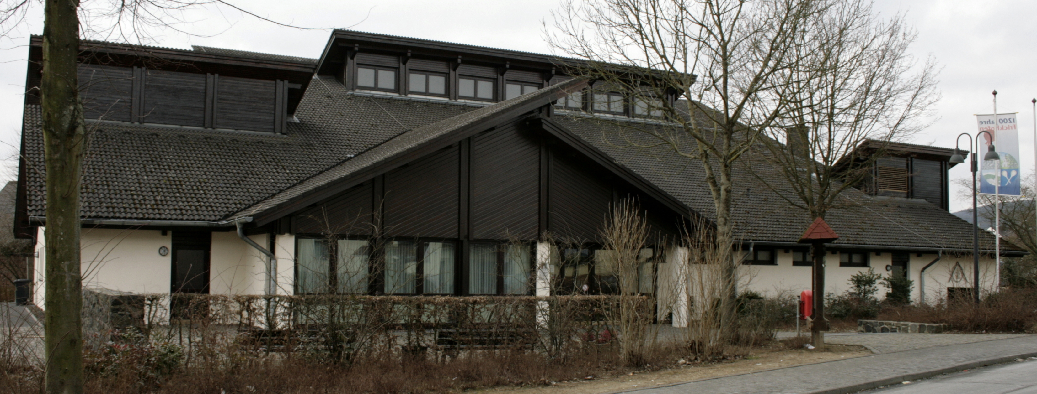 Bürgerhaus in Frickhofen, Deutschland